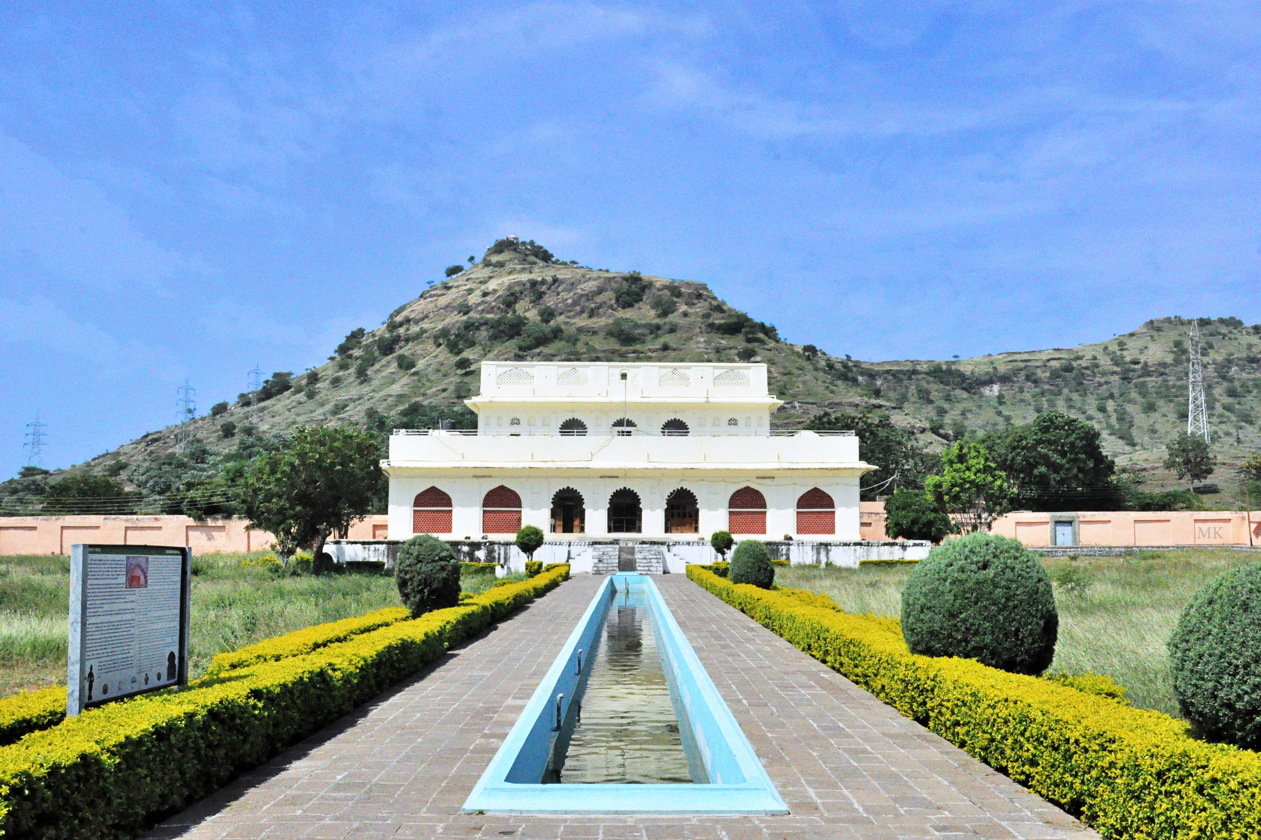 सोनेरी महाल, औरंगाबाद